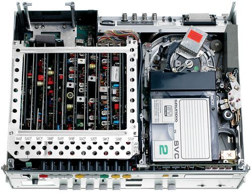 professioneller Videorekorder von Grundig Geschäftsbereich electronic, Typ VCR 621 aus dem Modelljahr 1982, schnittfähig, digitaler Bandzugspeicher im Schnittbetrieb, schnittsteuerfähig, zwei gleichwertige, einzeln editierbare Tonspuren